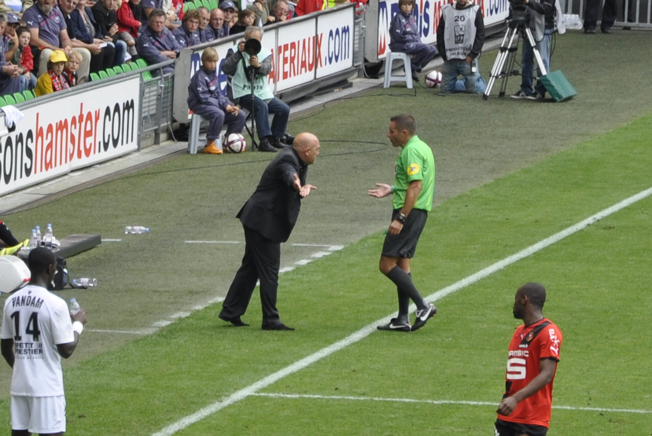 Discussion entre Frédéric Antonetti et Philippe Malige lors du match Rennes Caen comptant pour la Template:4e journée du championnat de ligue 1 2011-2012